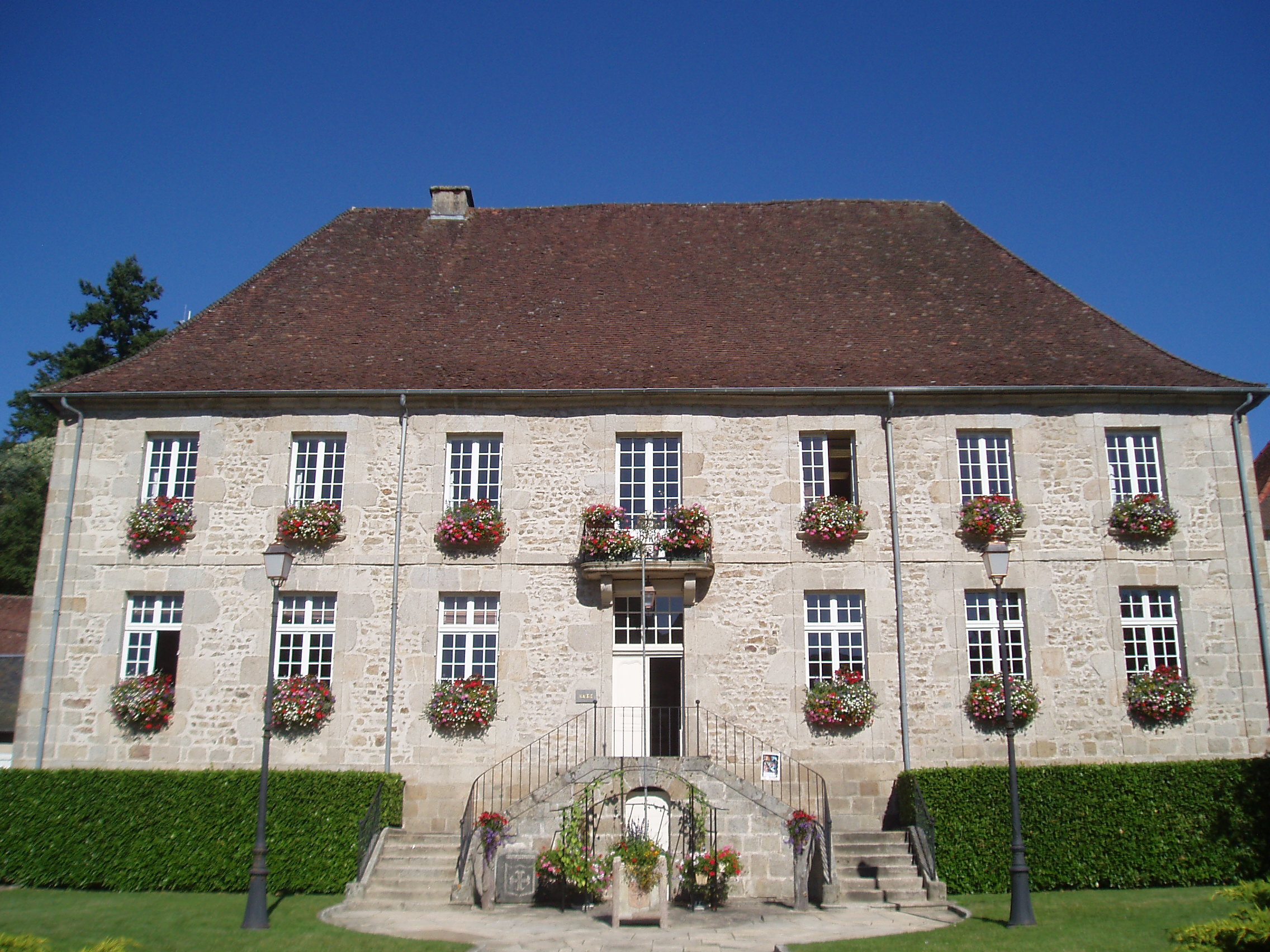 Mairie de Felletin sous le soleil